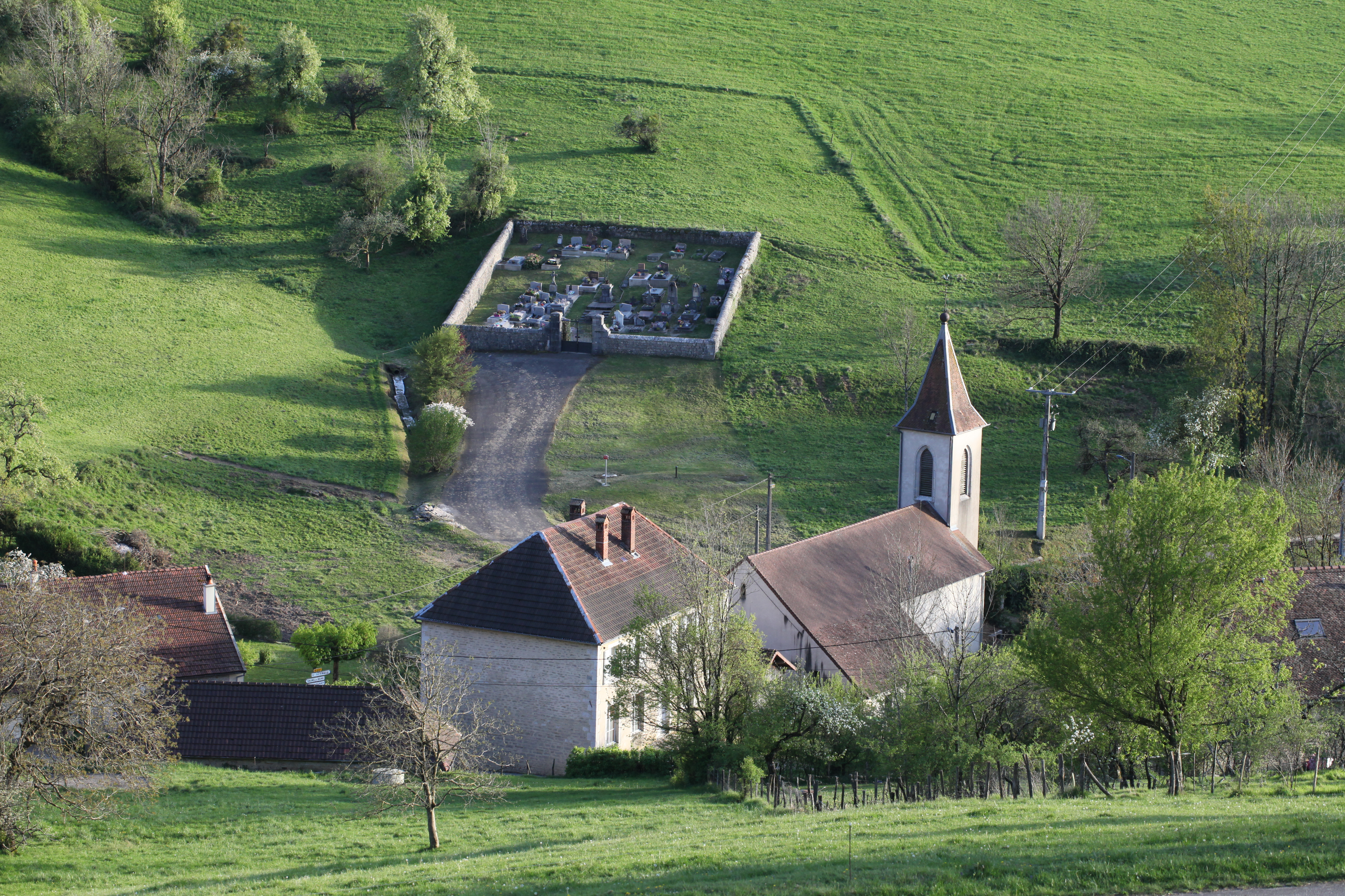 Vue du village d'Ivrey (Jura).